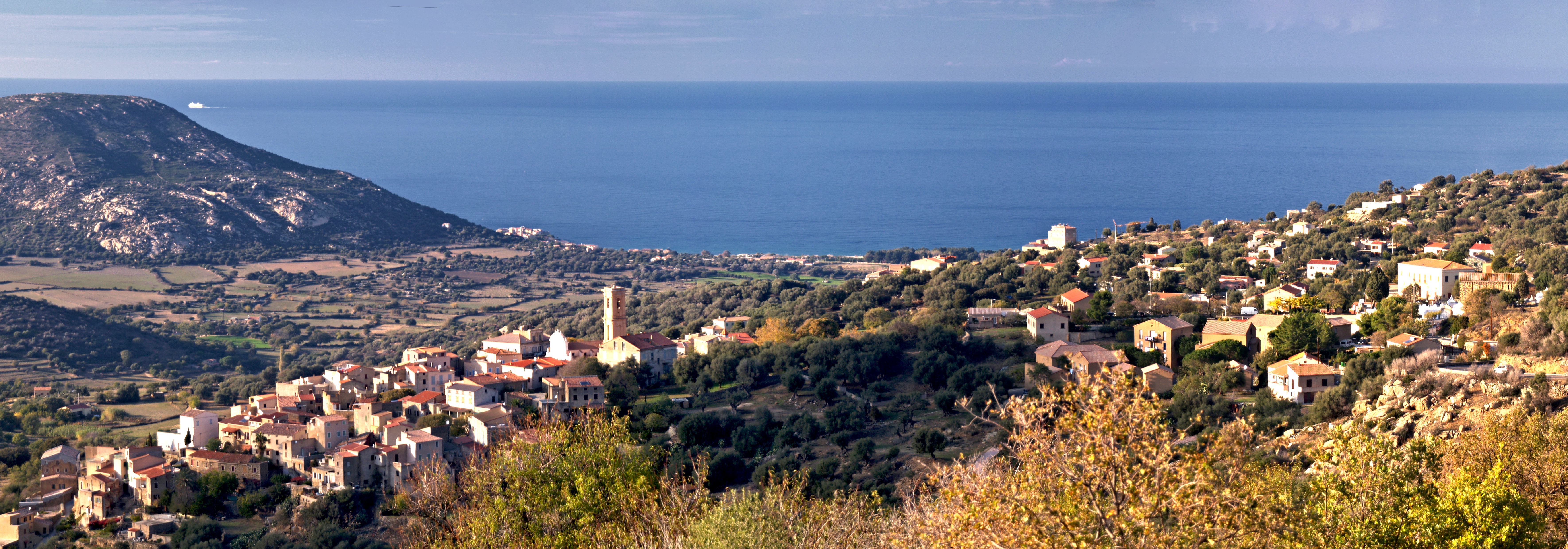 Aregno (Corsica) - Panorama